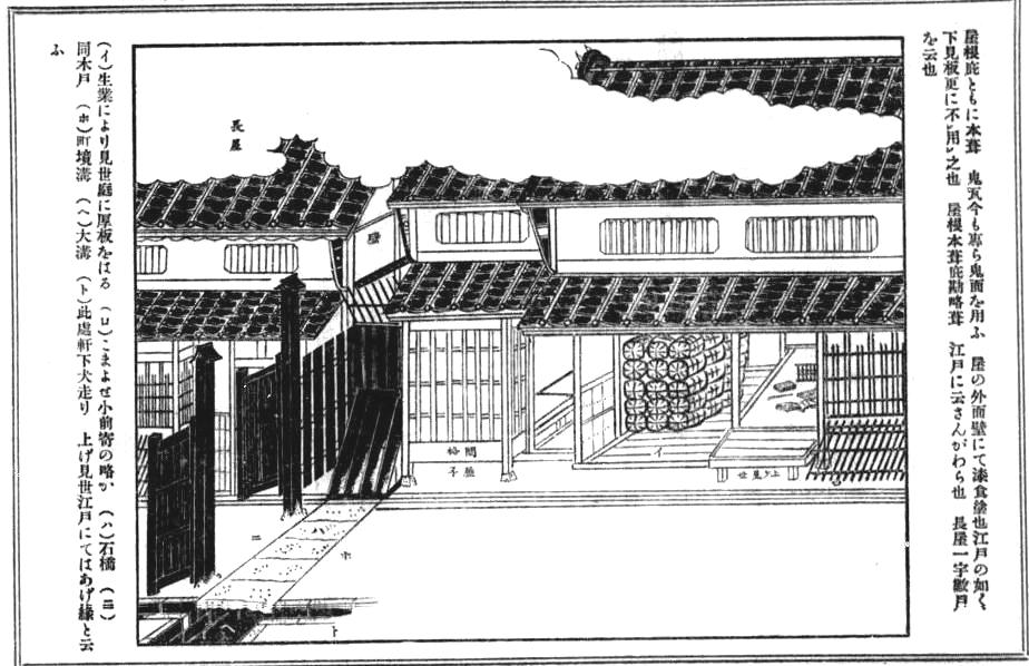 長屋の図。 喜田川季荘 著 『類聚近世風俗志 : 原名守貞漫稿』